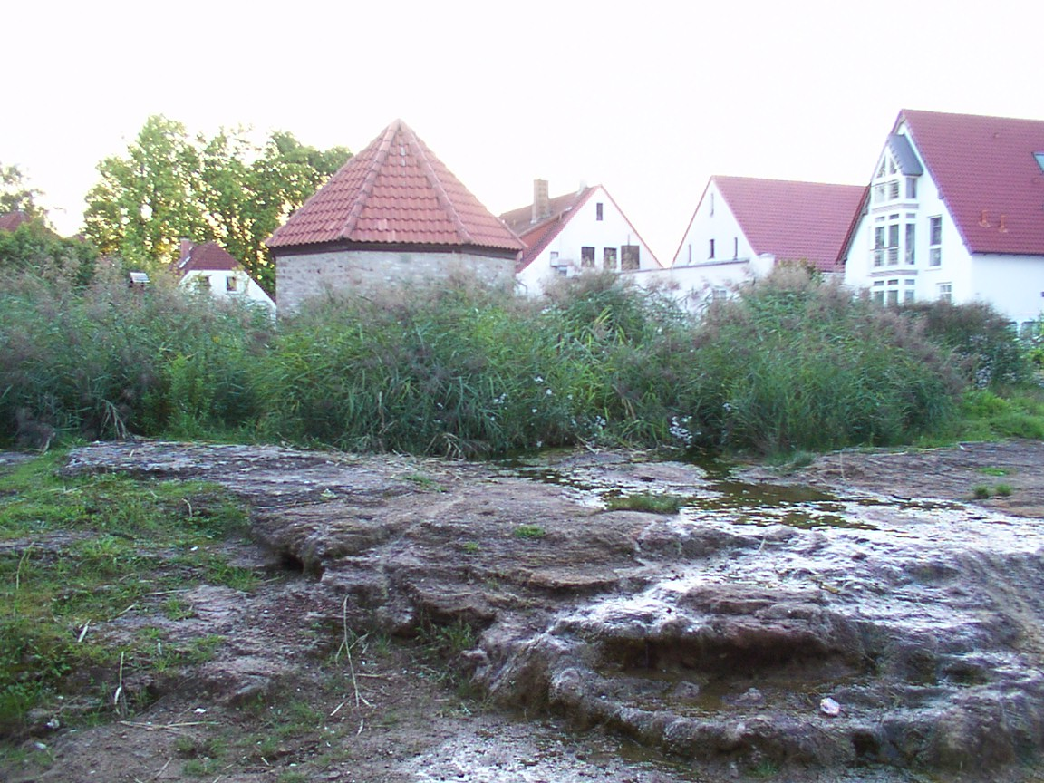 Salzkotten: Blick vom Rathaus zum Kütfelsen mit dem Brunnenhaus der Unitasquelle